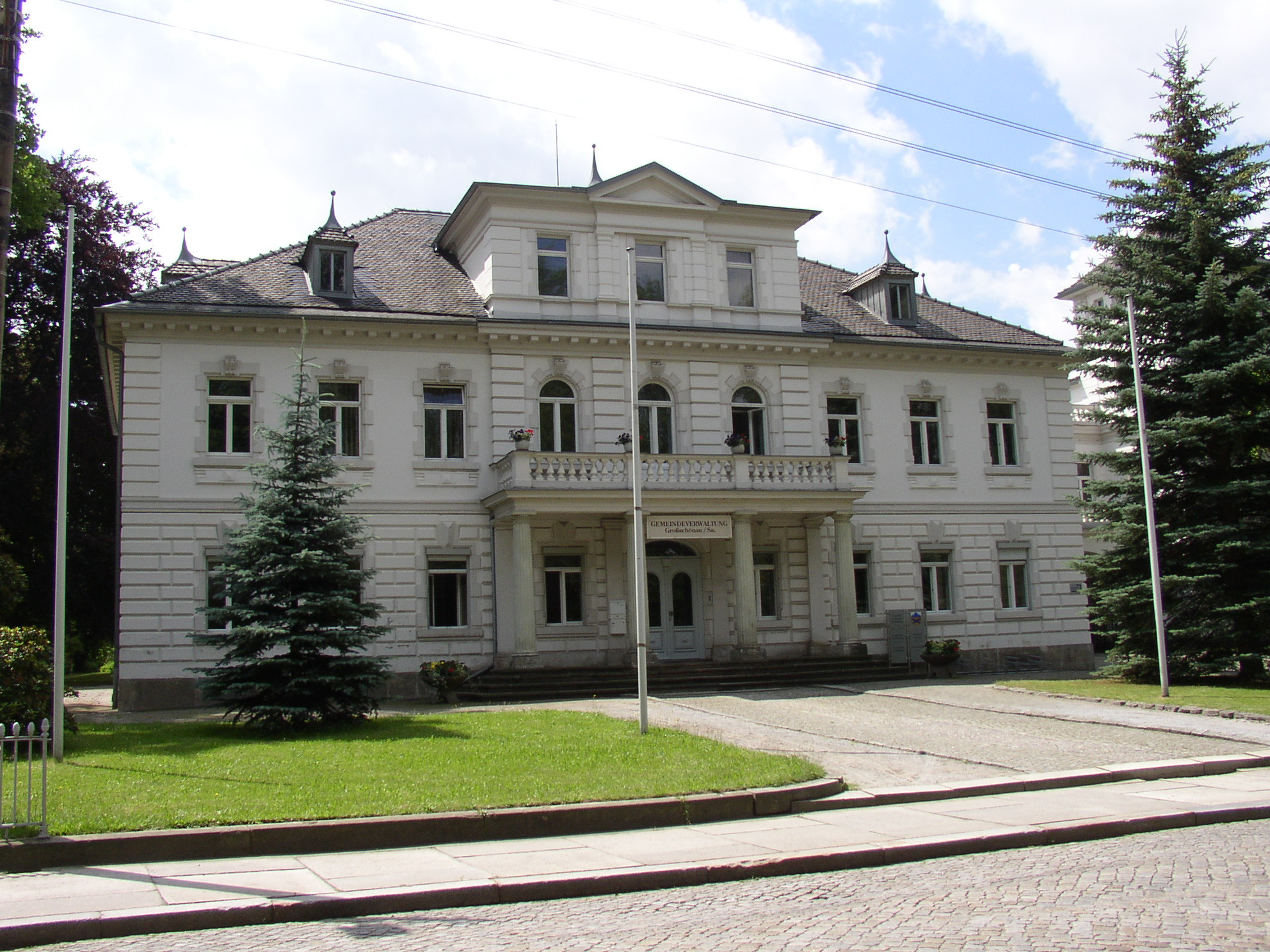 Gemeindeverwaltung Großschönau, Landkreis Löbau-Zittau, Sachsen